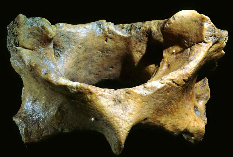 Archaeozoology עצמות בעלי חיים שנמצא בחפירה ארכאולוגית פרהיסטורית חולית אטלס של חזיר עם סימן חיתוך בחלקה העליון המעיד על שחיטה באמצעות עריפת ראש החיה. נתגלה במצודה הרומית של שער העמקים